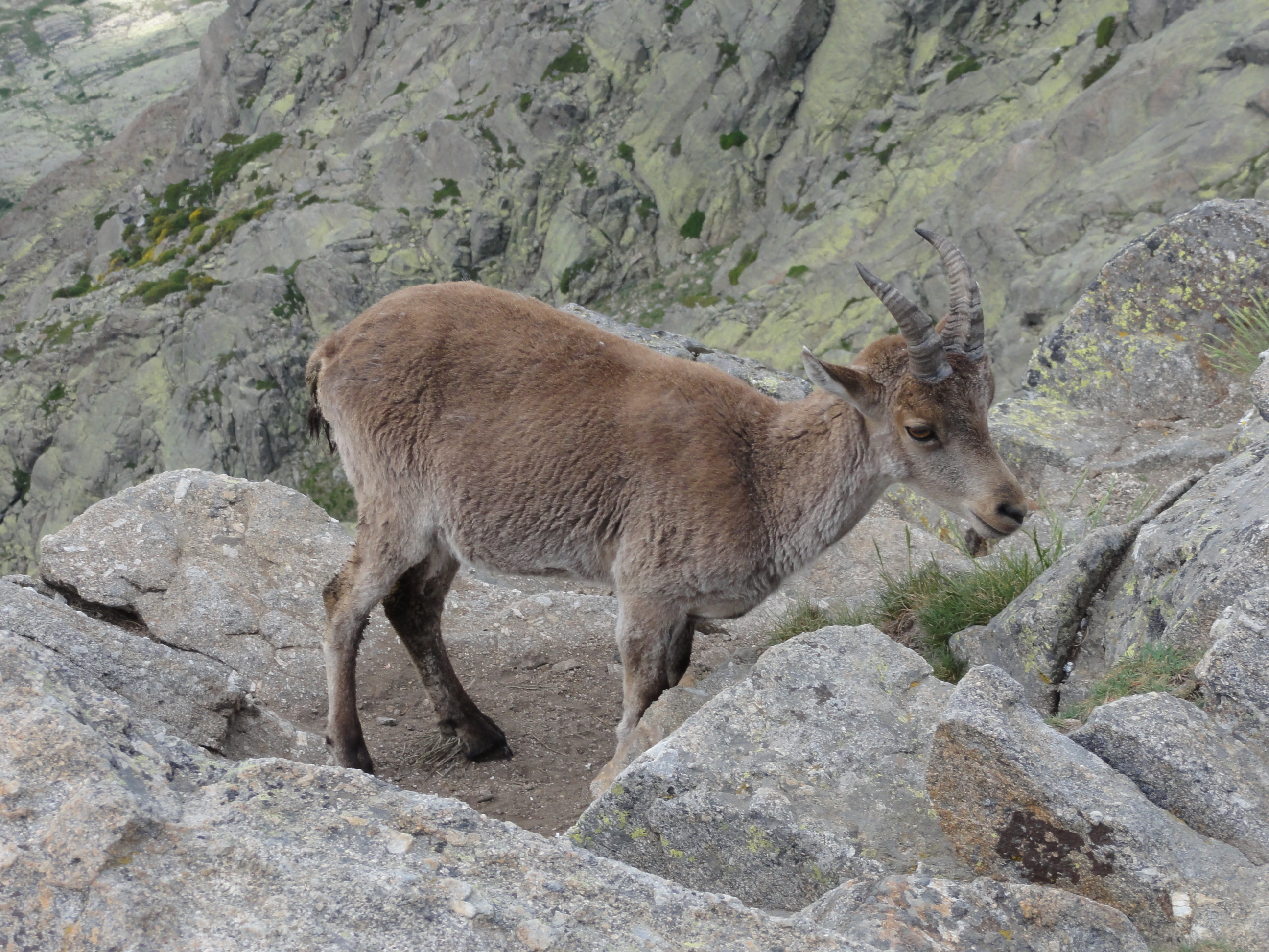 Cabra bastante mansa en la Senda de la Laguna Grande This is a photography of a Special Area of Conservation in Spain with the ID: ES4110002. Natura2000 entry, EEA entry